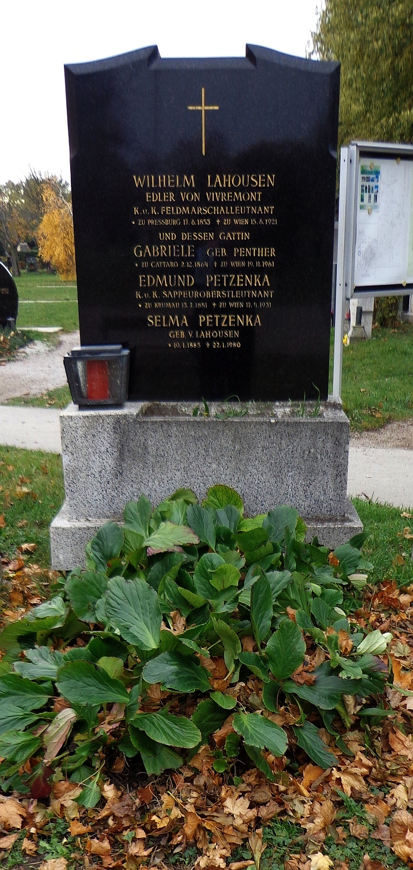 Wiener Zentralfriedhof - Gruppe 40: Grab des k.u.k. Feldmarschallleutnants Wilhelm Lahousen von Vivremont (außerhalb des Ehrenhains, kein ehrenhalber gewidmetes Grab)